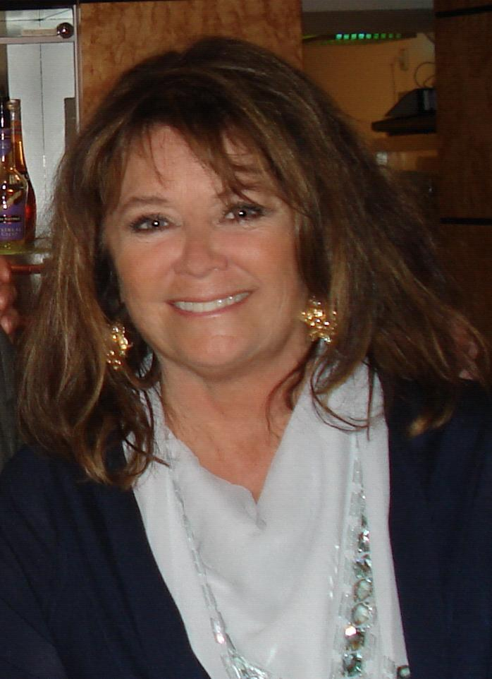 Entertainerin Wencke Myhre im Radisson Hotel Erfurt